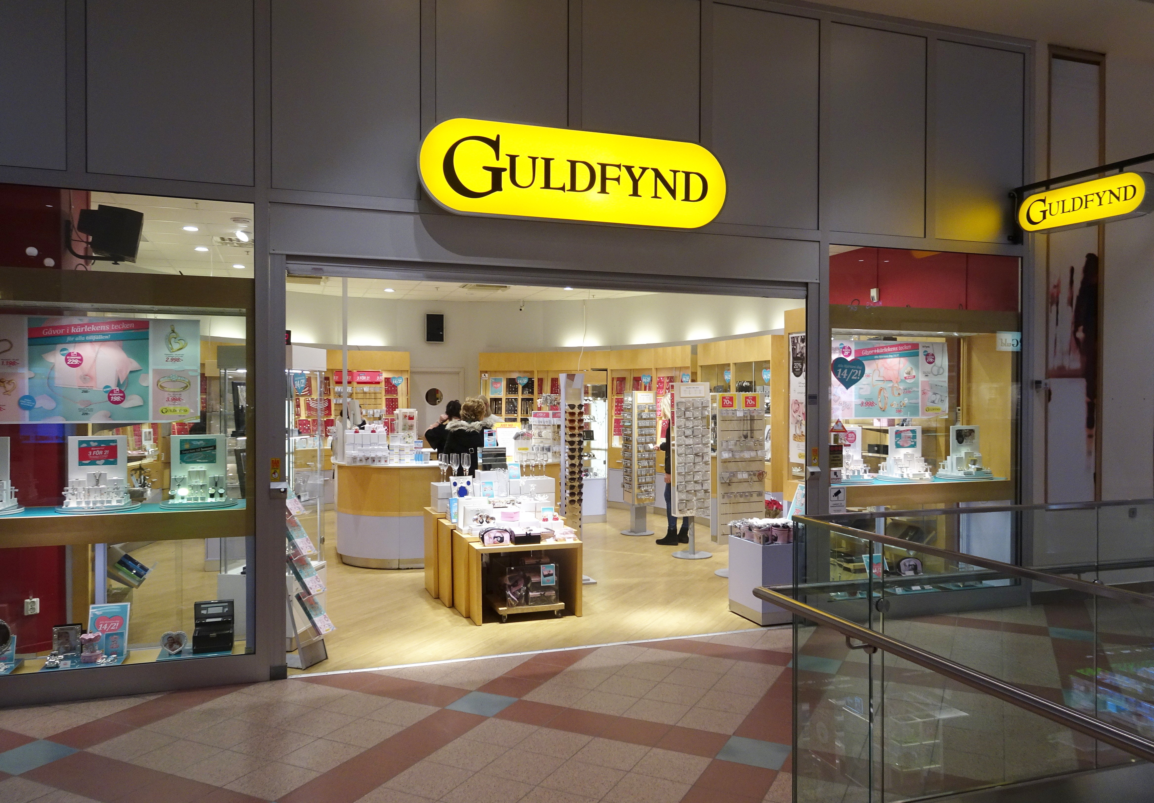 Guldfynd, Farsta centrum